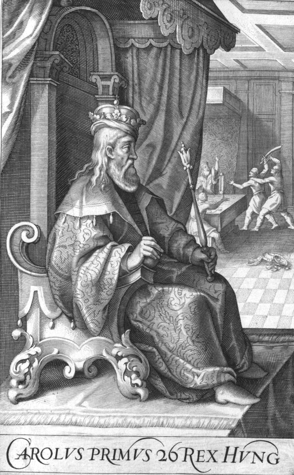 Karl I. Robert, König von Ungarn